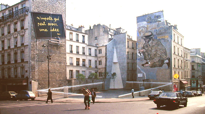 Un carré pour un square (Place Fréhel) vue générale